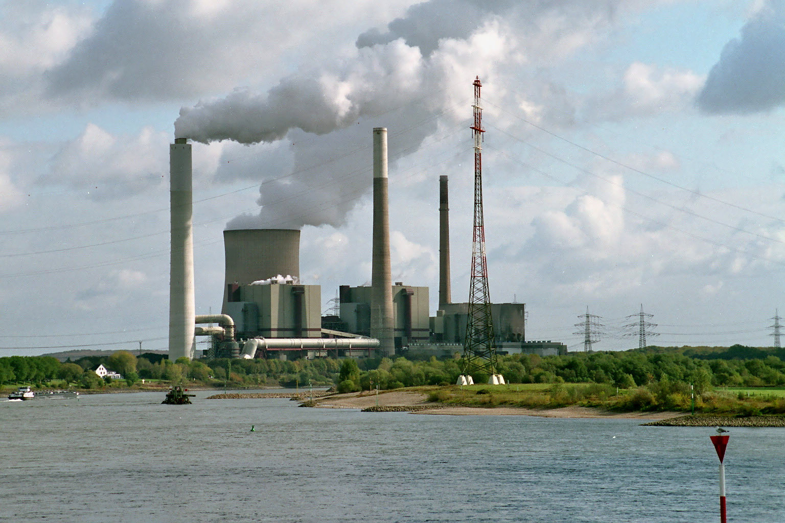 Rhein-Freileitungskreuzung Voerde, Tragmast in Rheinberg gegenüber Götterswickerhamm, Kraftwerk Voerde